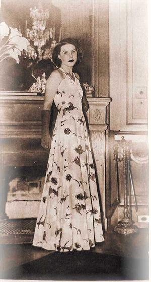 Amalia Lacroze en su debut en sociedad en 1939.